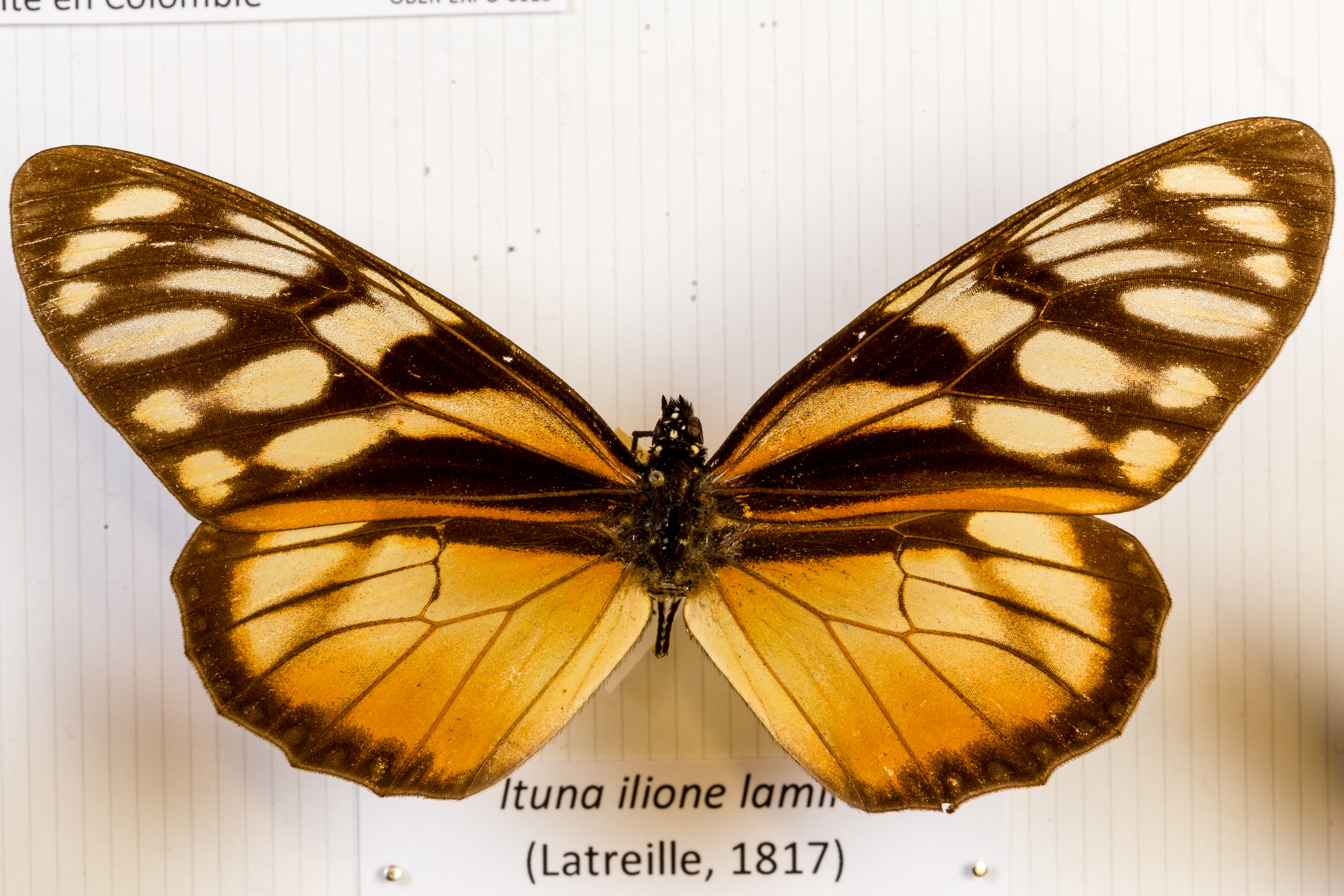 Face dorsale.